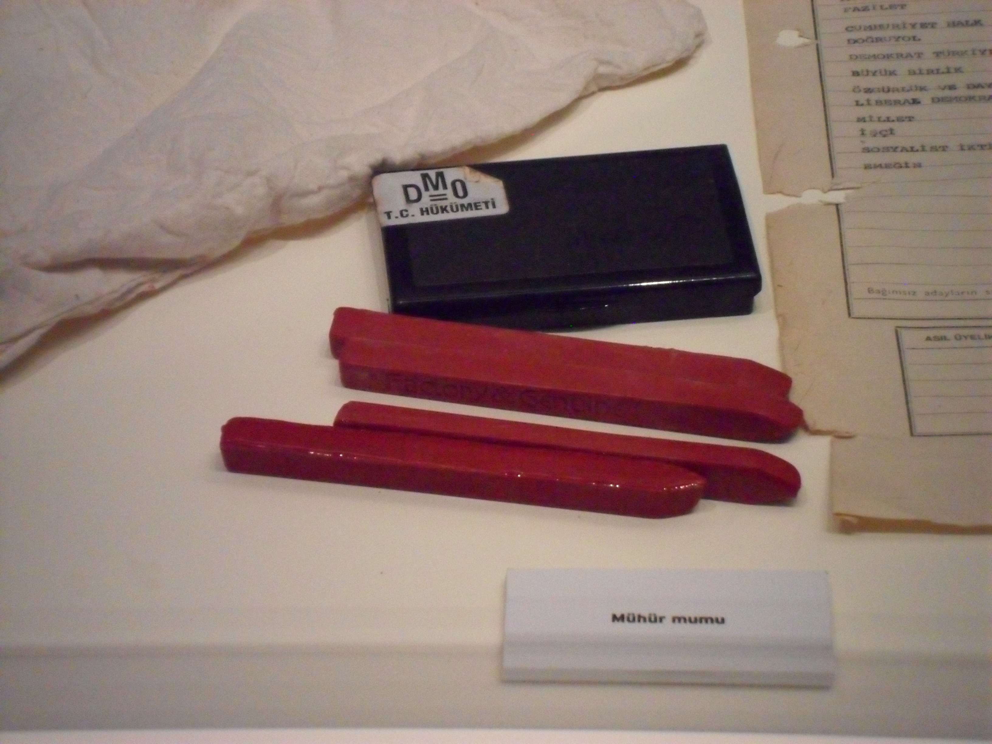 Samsun Kent Müzesi'nde sergilenen mühür mumu.